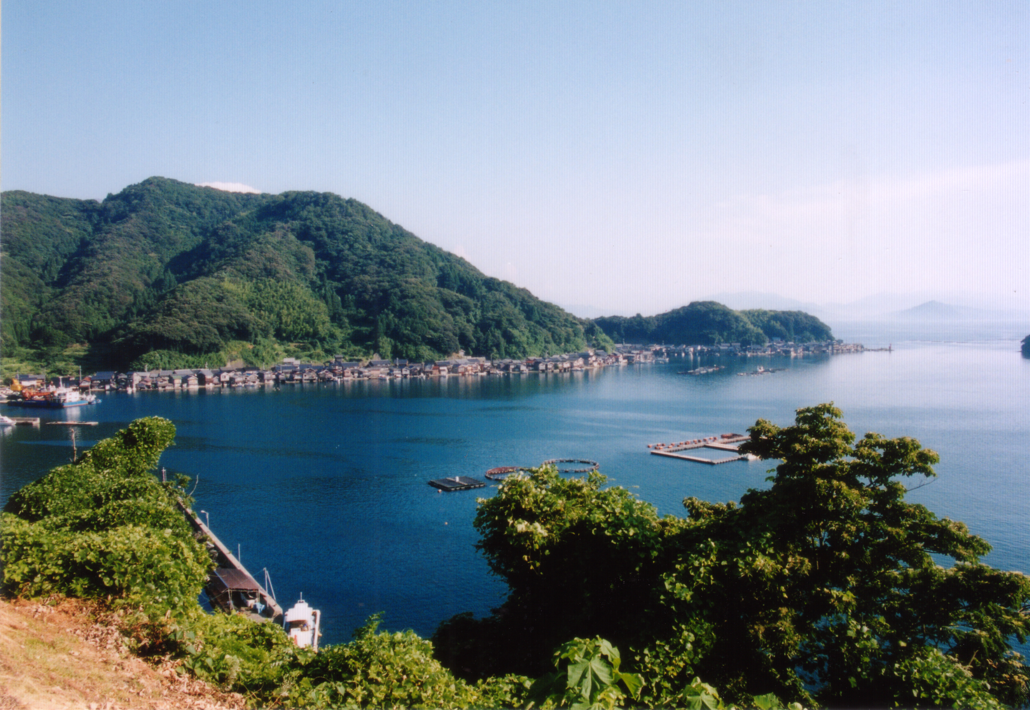 Ine, Kyoto, Japan